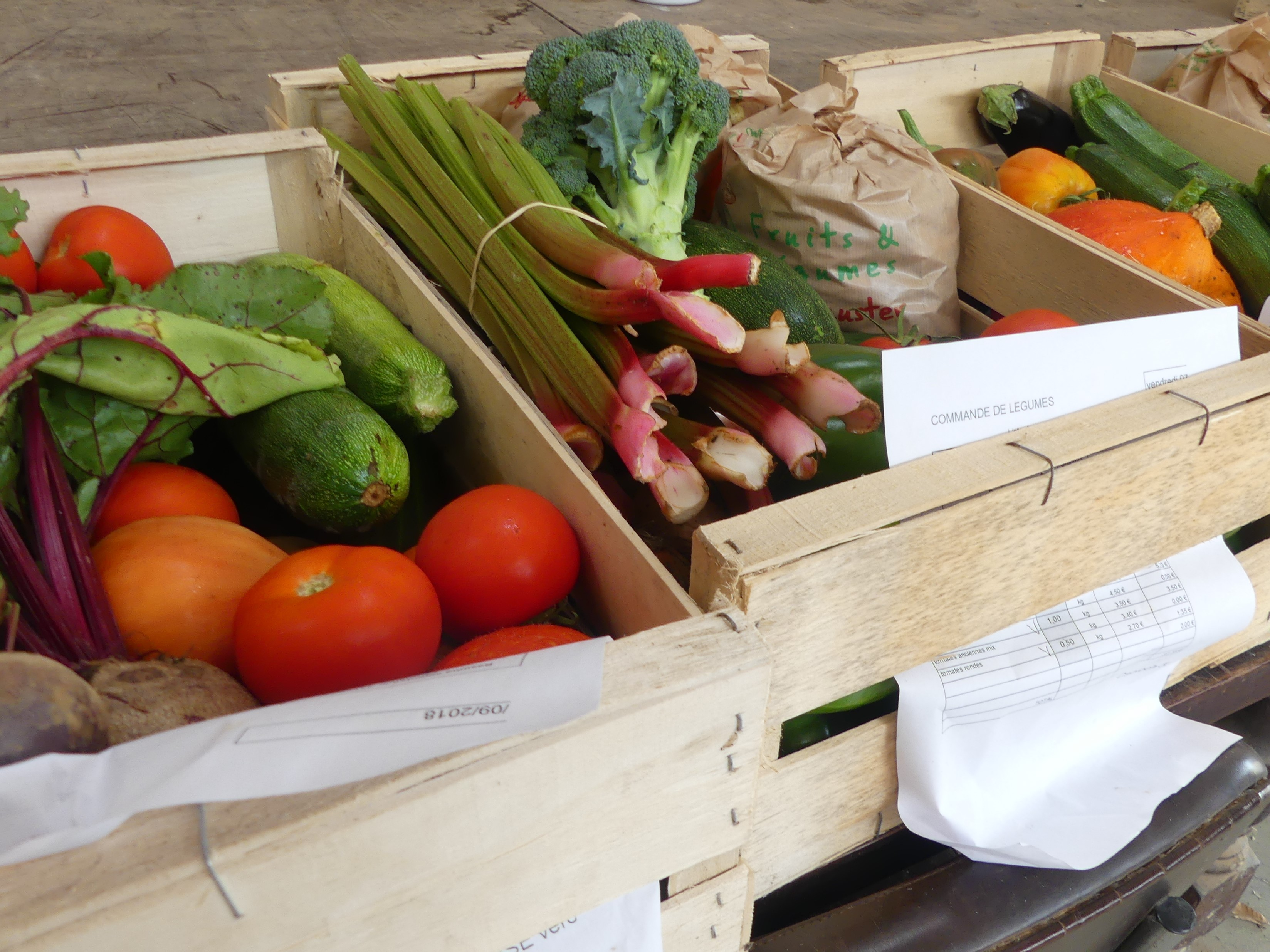 L'exploitation agricole de Suscinio propose, tous les vendredis, des paniers "bio" : des dizaines de légumes de saison sont proposés en vente directe.